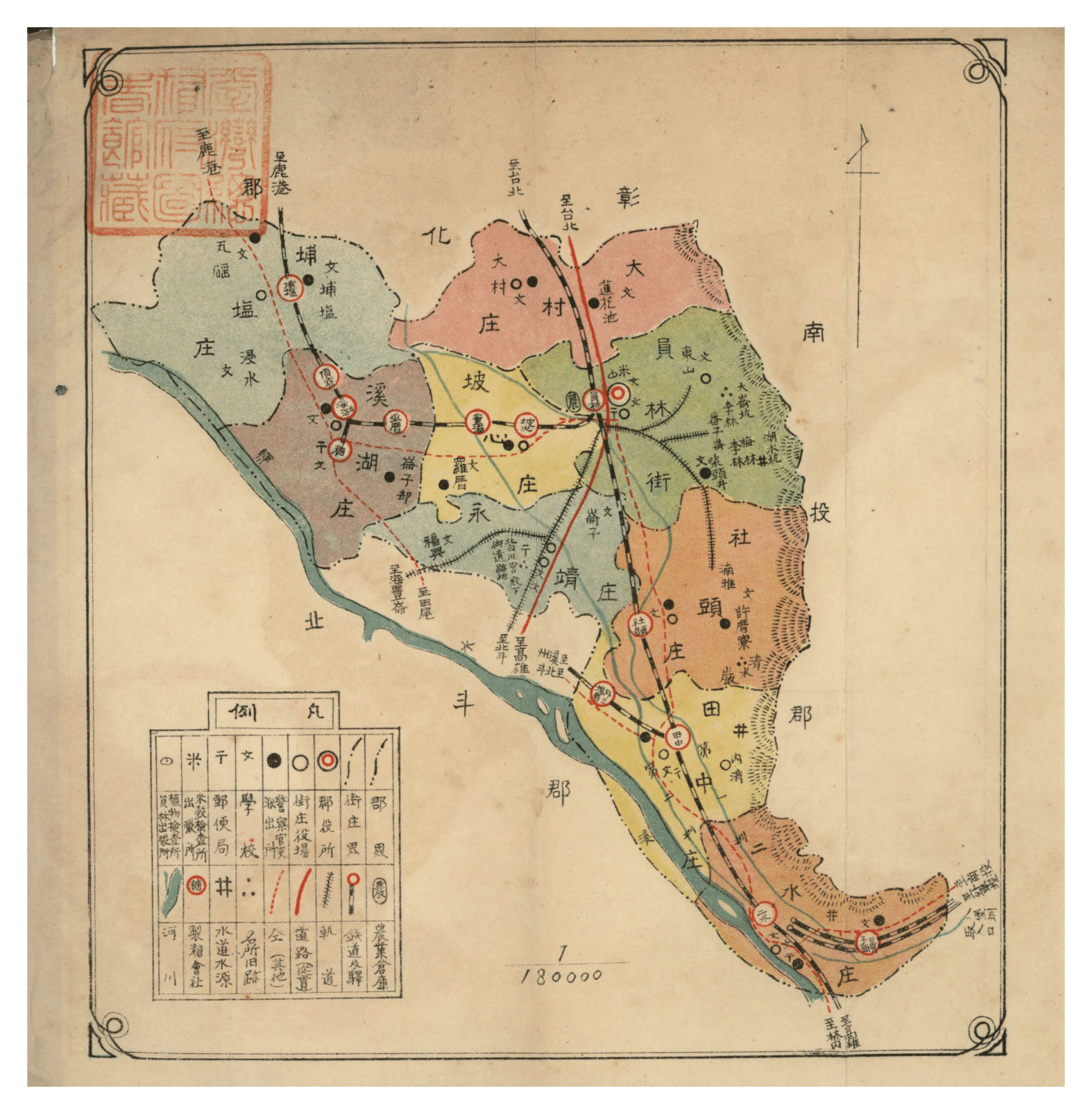 員林郡管內略圖